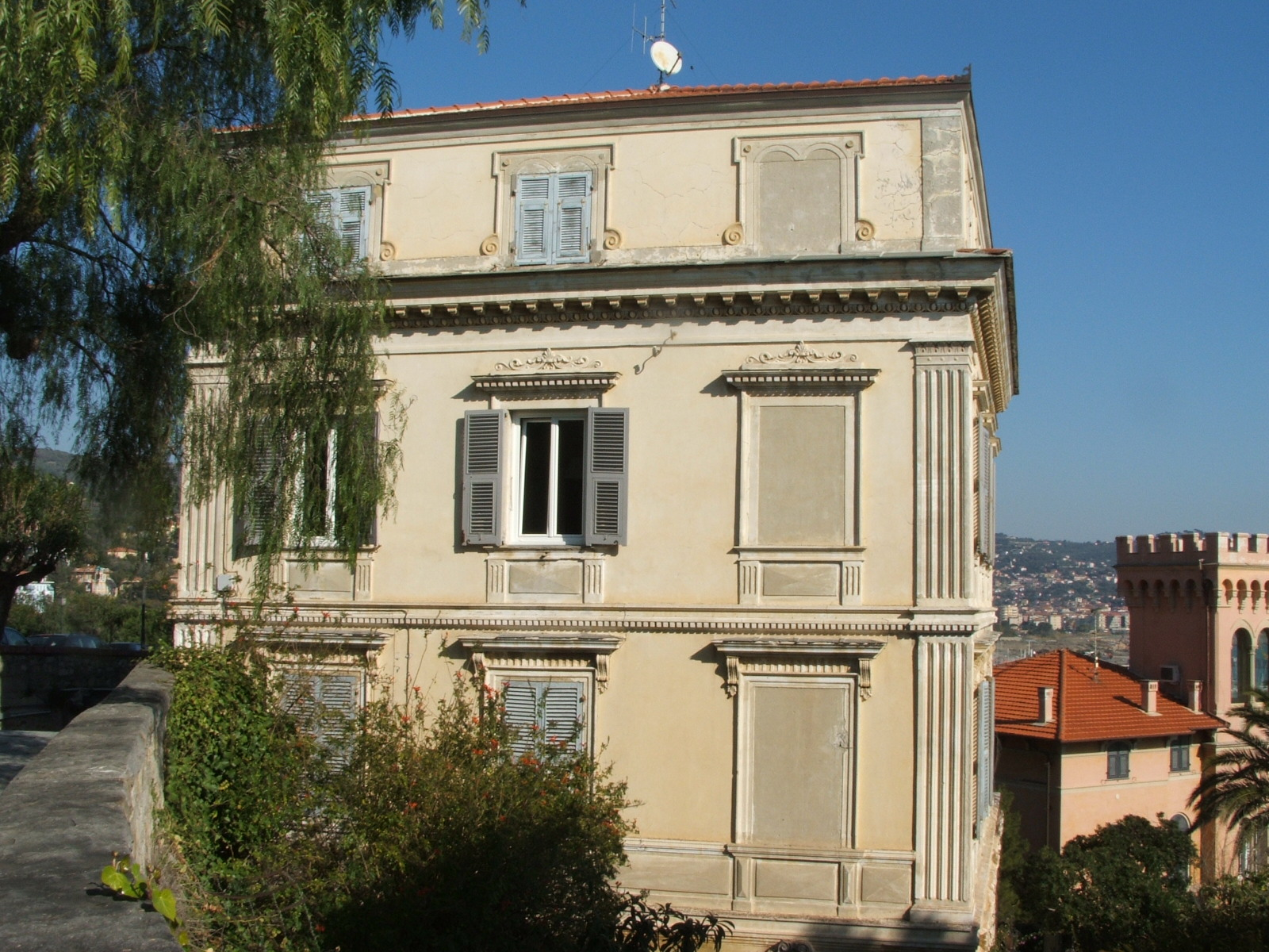 Immagine da Imperia Casa natale del premio Nobel Giulio Natta